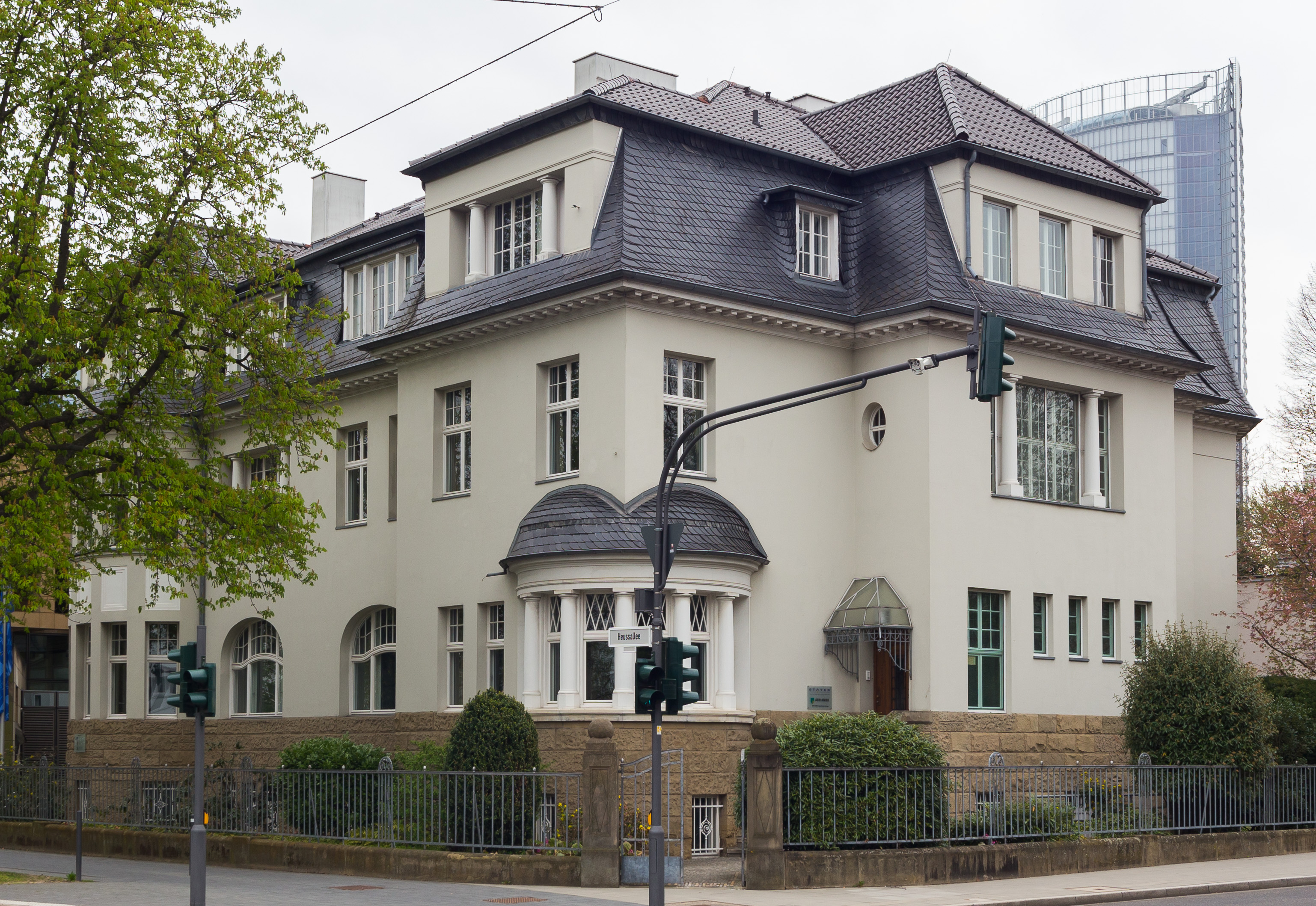 Doppelvilla, Heussallee 18–20, Bonn: Ansicht aus Westen